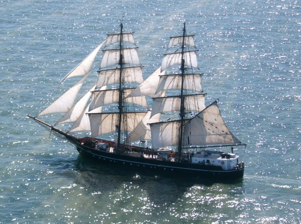 Luftbild Roald Amundsen